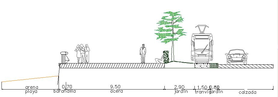 Sección transversal del paseo marítimo de Orzán-Riazor, La Coruña, España.